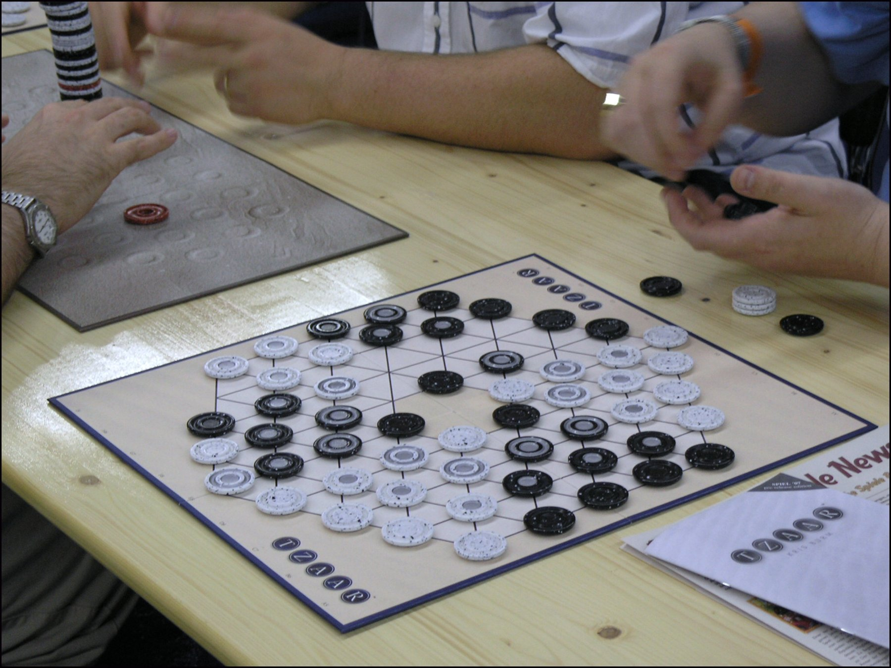 TZAAR (Essen Spiel'07)